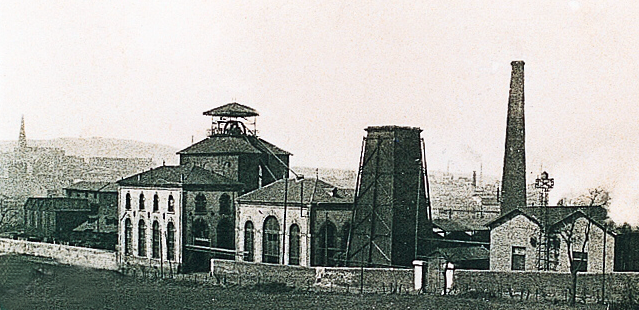 Puits Verpilleux n°1, Saint-Etienne, 42, Fr.